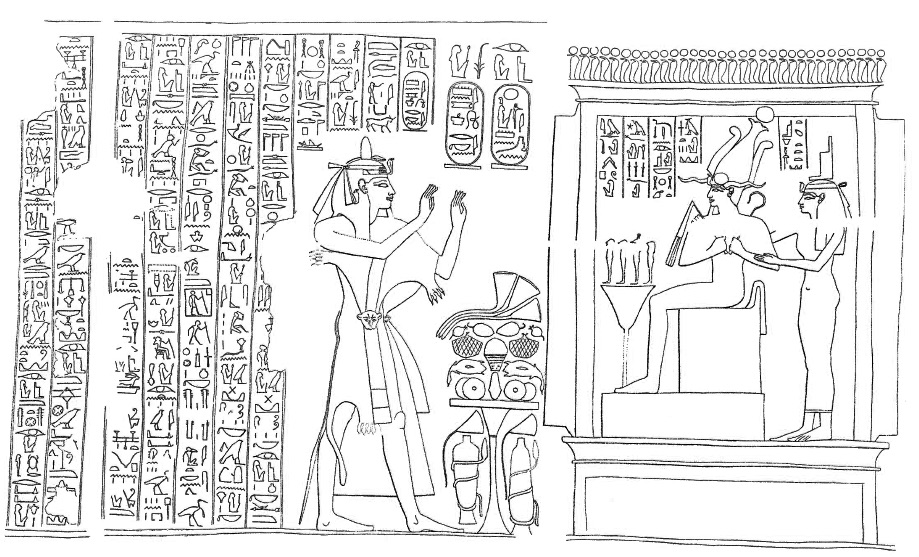 Kopie nápisu na stěně hrobky NRT I v Tanis; Osorkon II. předkládá obětiny bohu věčnosti Osirovi sedícímu na trůnu, v pozadí bohyně Isis